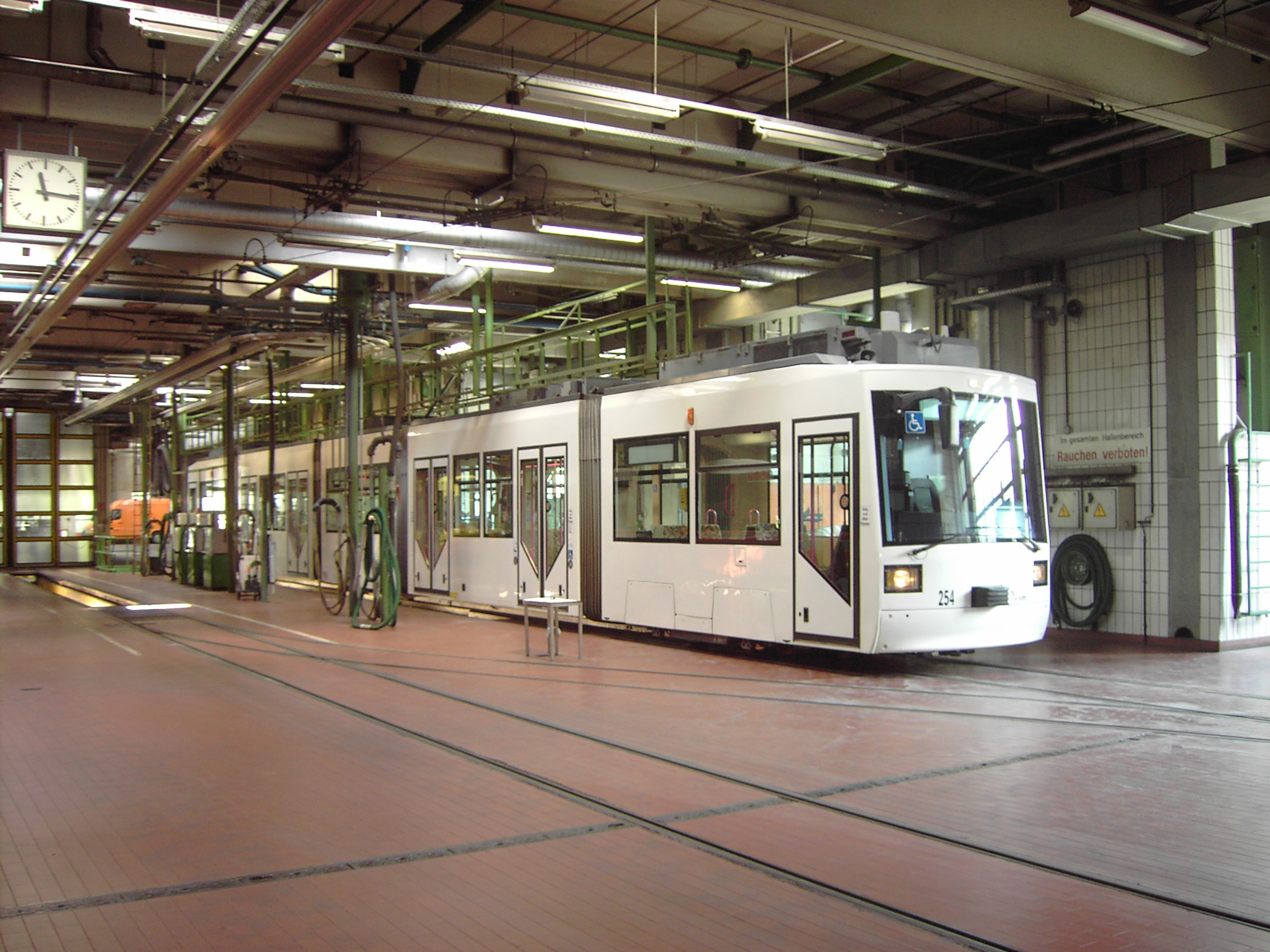 Ein Straßenbahntriebzug des Typs GT-N der Würzburger Straßenbahn GmbH steht im Betriebshof Sanderau